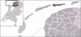 Locatie van Nes, zelf gemaakt uit sjabloon van Wikipedia-gebruiker Mtcv